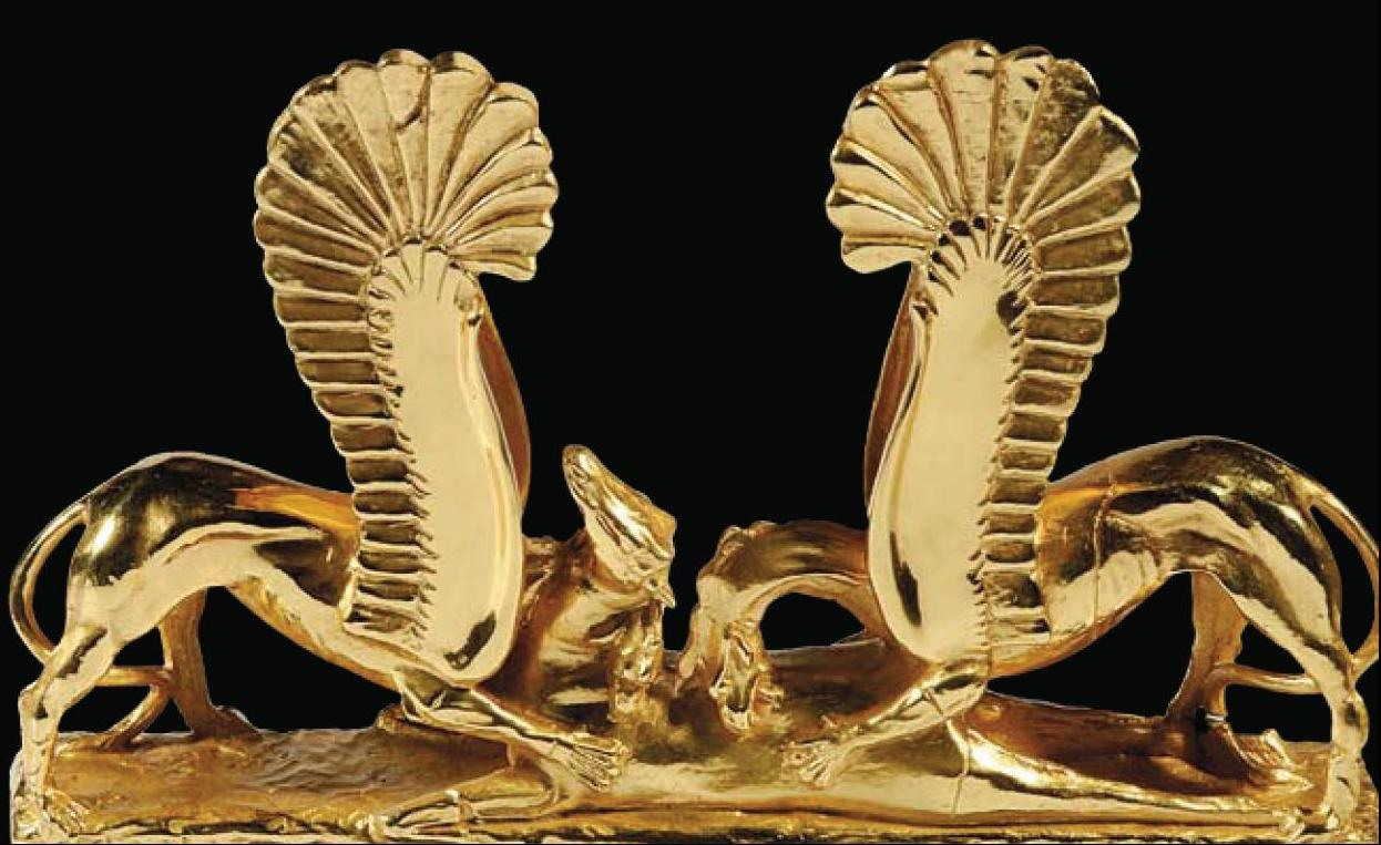 ANSPI Ascoli Satriano